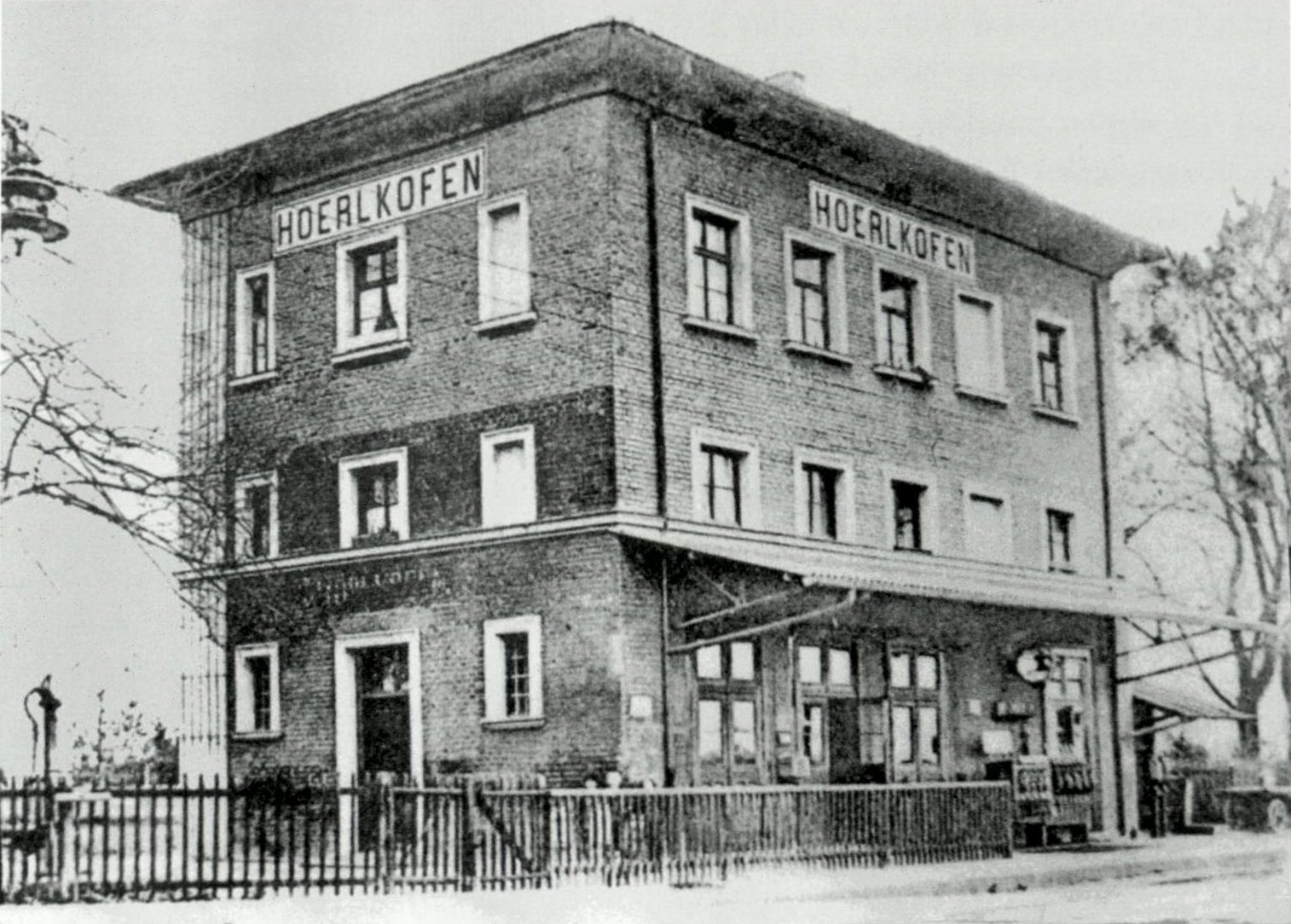 Empfangsgebäude des Bahnhofs Hörlkofen von der Gleisseite, Ansicht von Süden. Im Mauerwerk ist noch die 1893 vorgenommene Aufstockung des Gebäudes erkennbar. Unter dem Vordach steht das Kurbelstellwerk der Bauart Krauss von 1900.